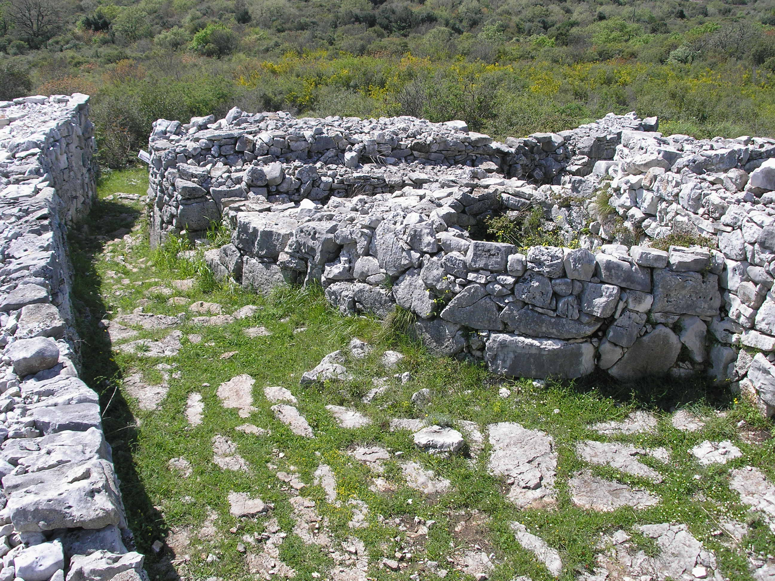 Monkodonja (Moncodogno) archaeological site in Istria